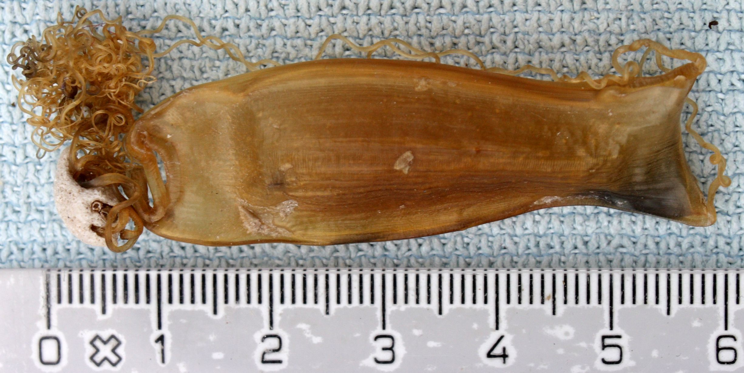 eggkapsel av småflekket rødhai Scyliorhinus canicula, andre siden.Template:Byline